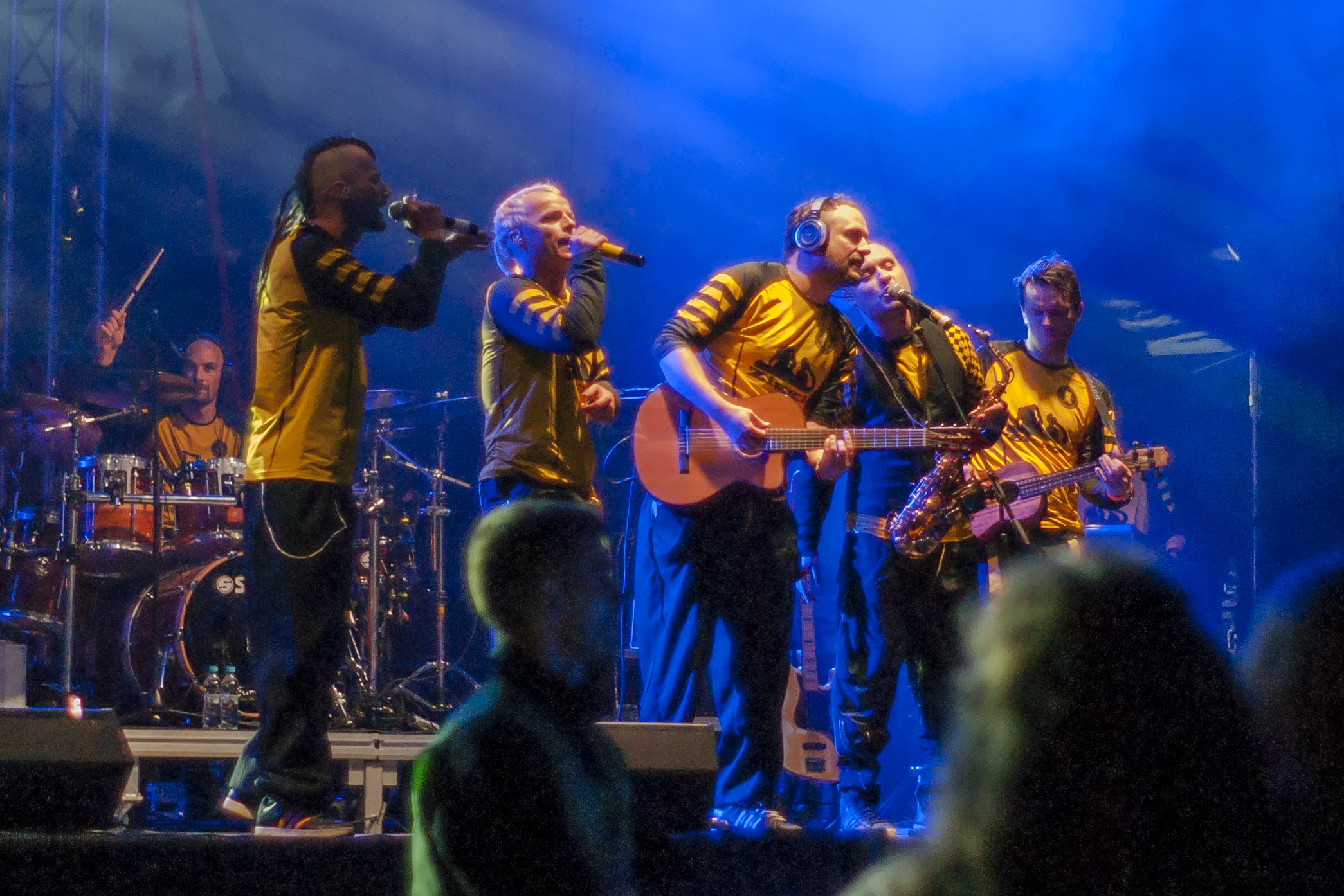 Zespół Dubioza Kolektiv na Festiwalu Ursynalia 2014